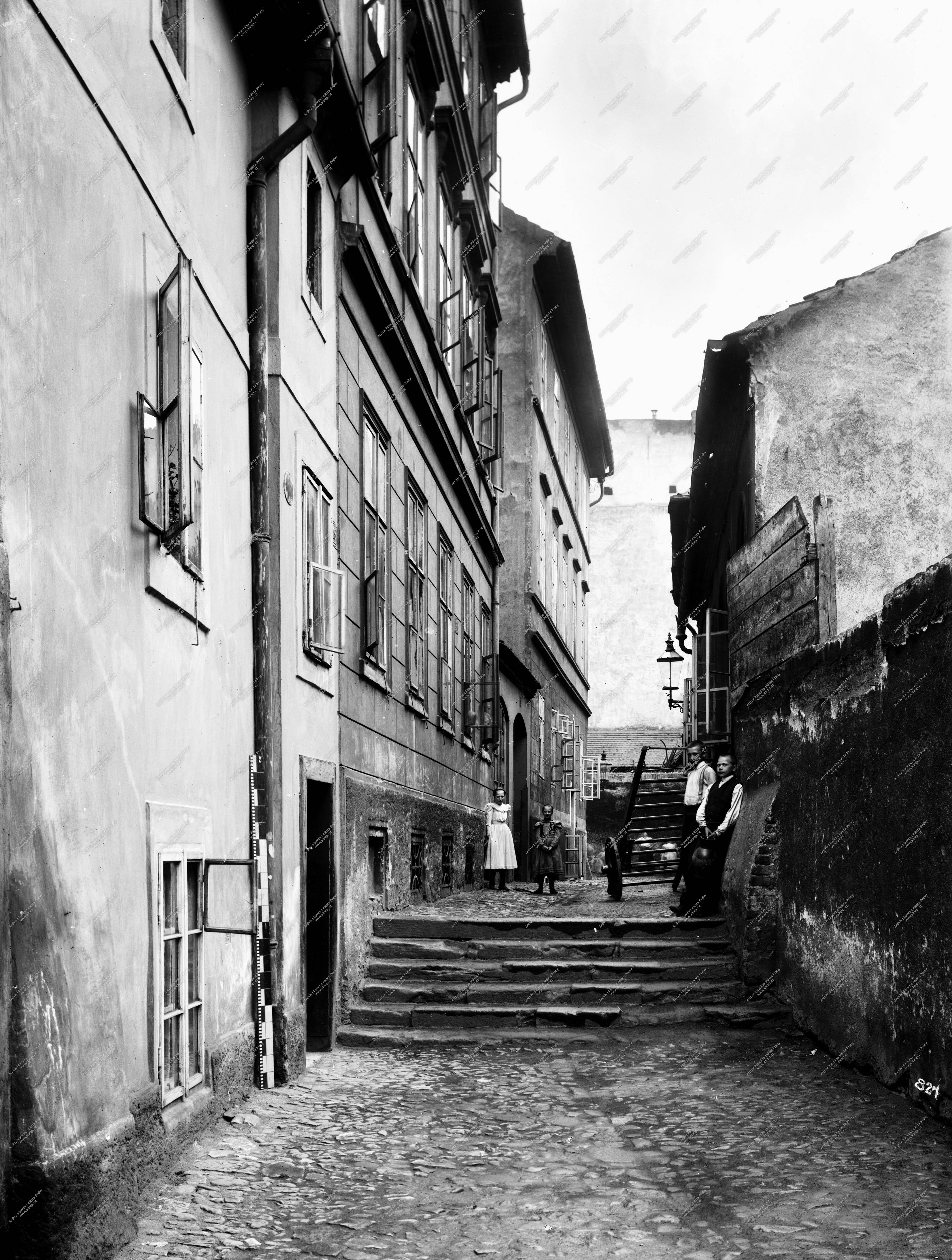 Průhled Klášterskou ulicí. Vlevo dům čp. 838 na Starém Městě.